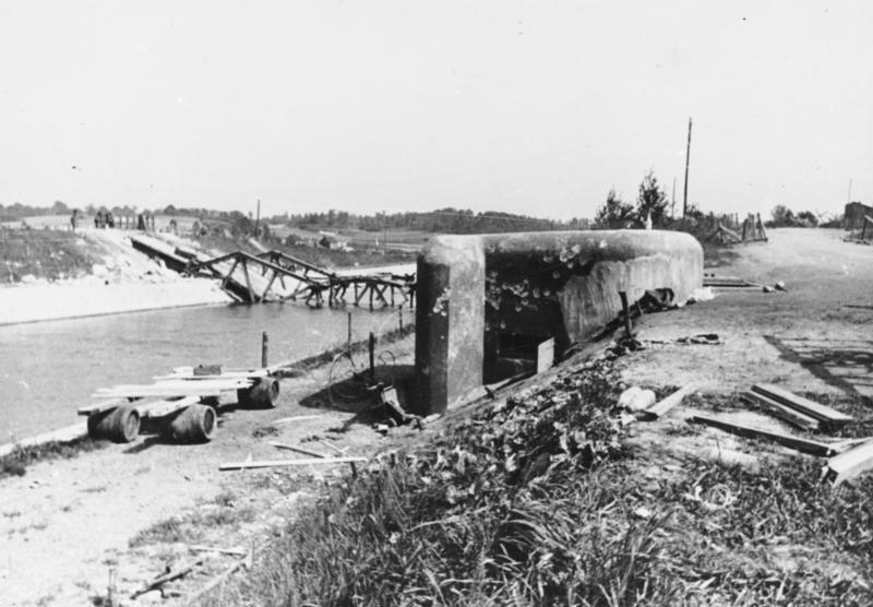 Belgien. Eben Emael bei Lüttich Von den Belgiern gesprengte Brücke zum Fort Eben Emael. Im Vordergrund: belg. Bunker. 23.5.40.